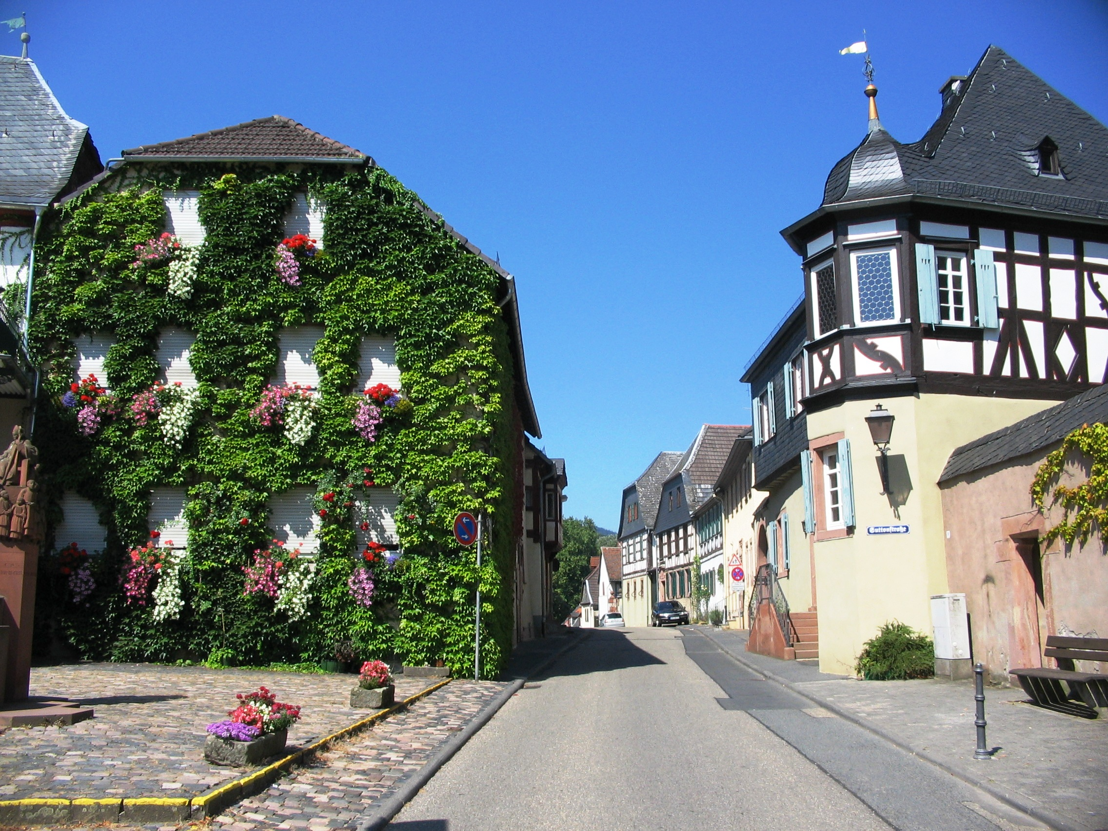 Blick vom Marktplatz in die Suttonstraße; das Haus links ist mit wildem Wein berankt, rechts Fachwerkhäuser